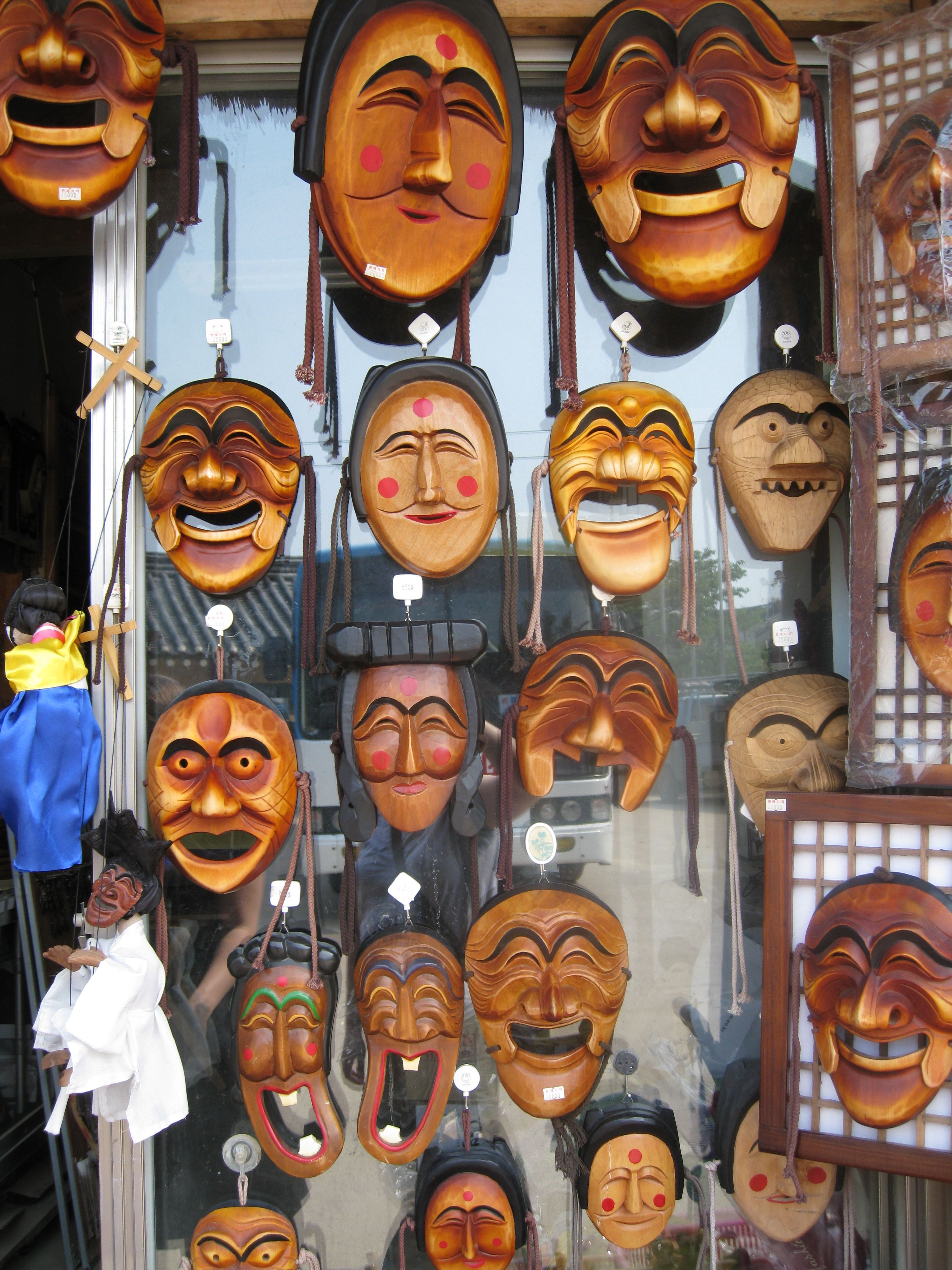 Hahoe mask